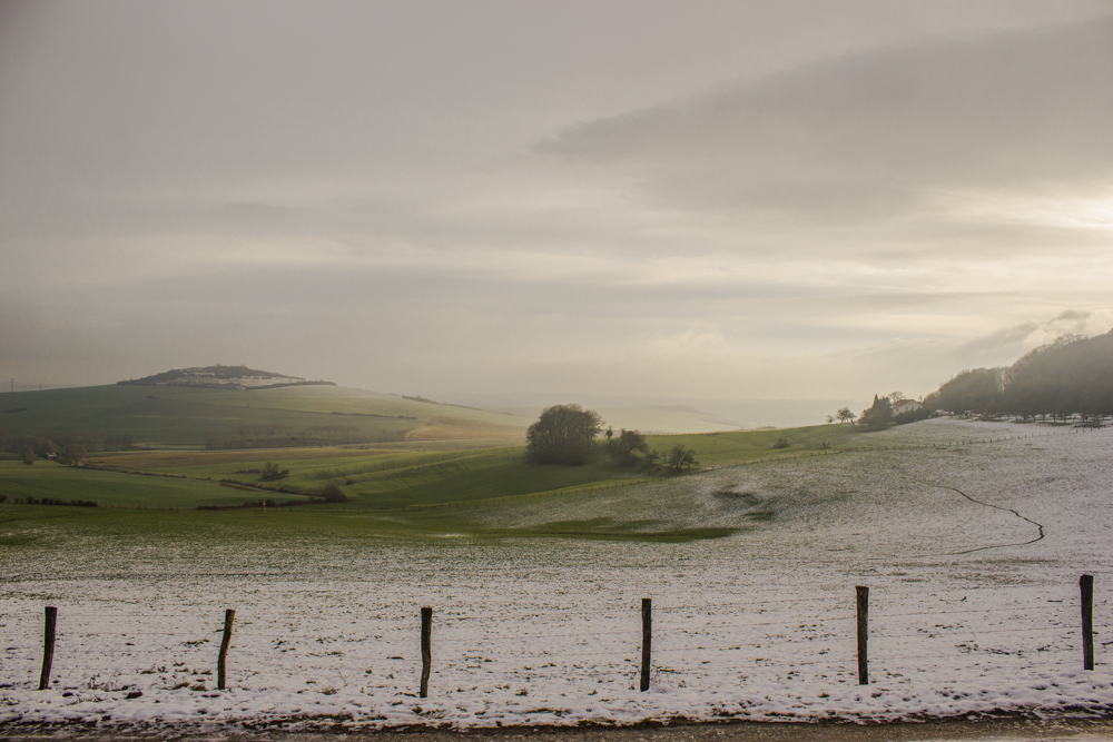 Neige plateau lorrain